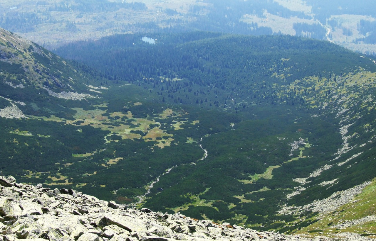 Dolna część doliny Ważeckiej i Jamski Staw